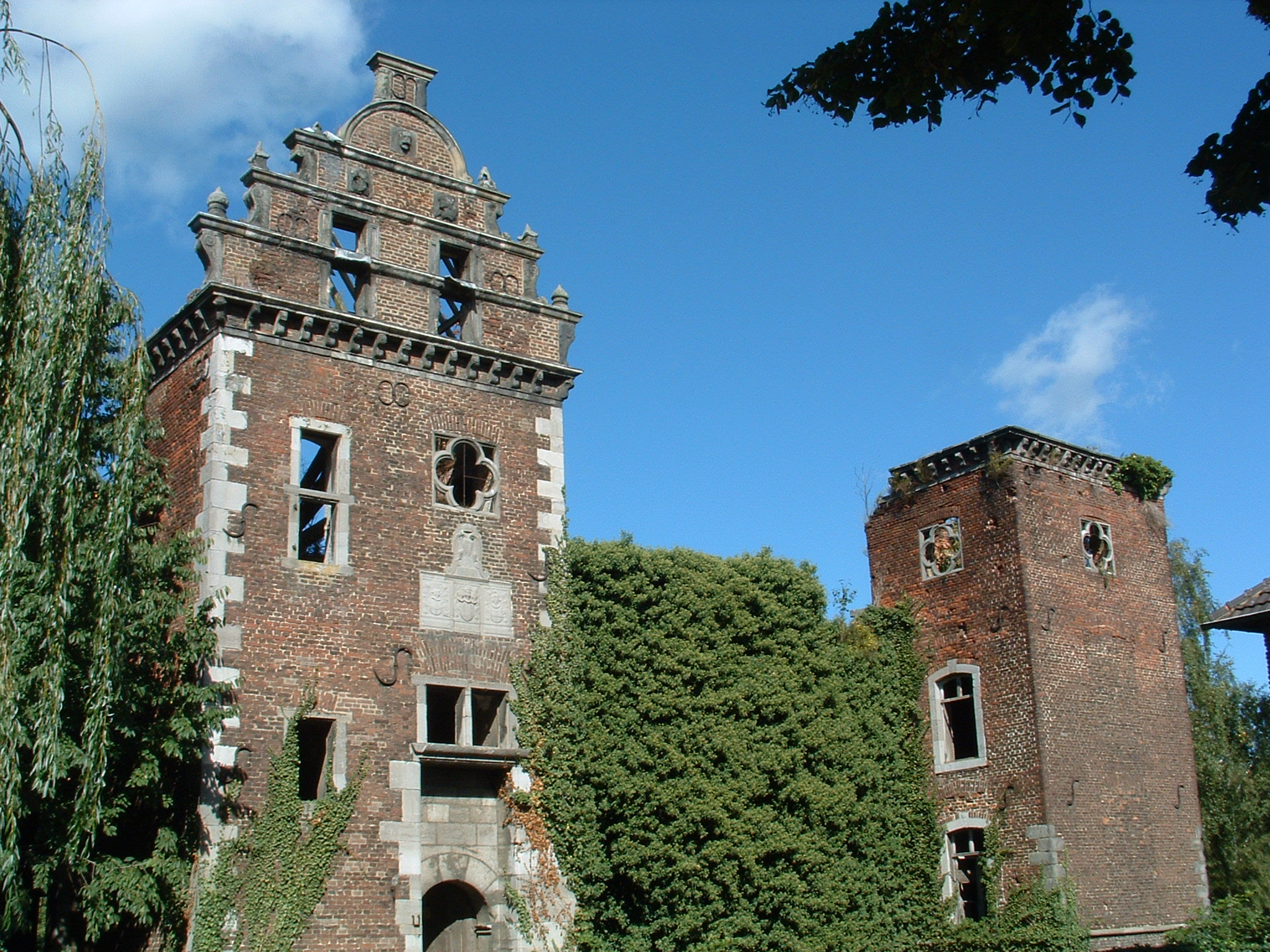 Deutschordenkommende Siersdorf, Aldenhoven